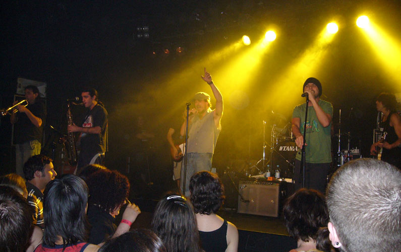 La Vela Puerca concert in 2007